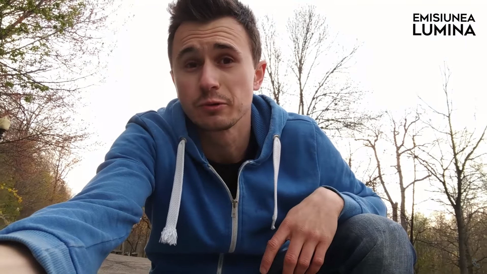 Prezentatorul moldovean de televiziune Andrei Bolocan, într-un video al „Emisiunea Lumina”, canal pe care îl administrează.